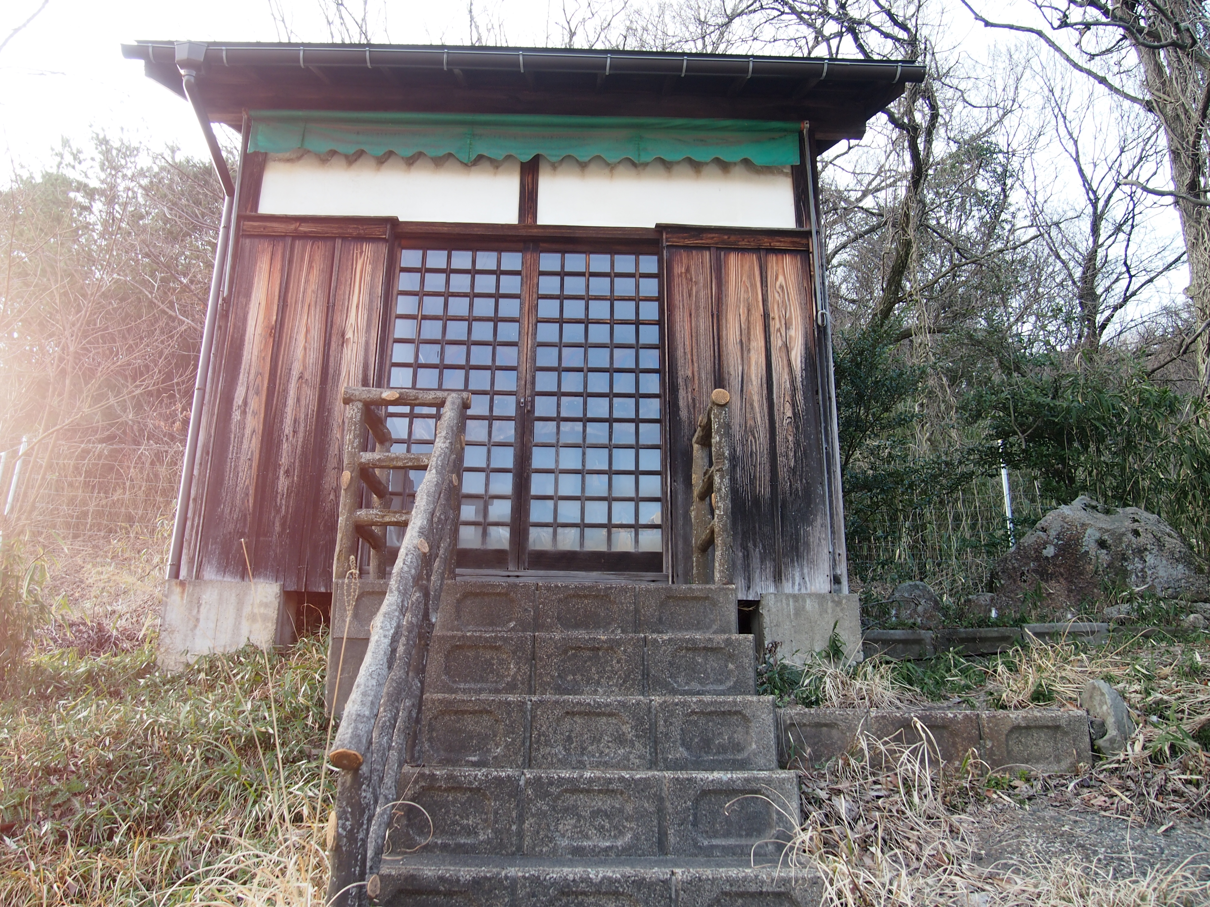 敦賀市馬坂峠近くの地蔵堂。